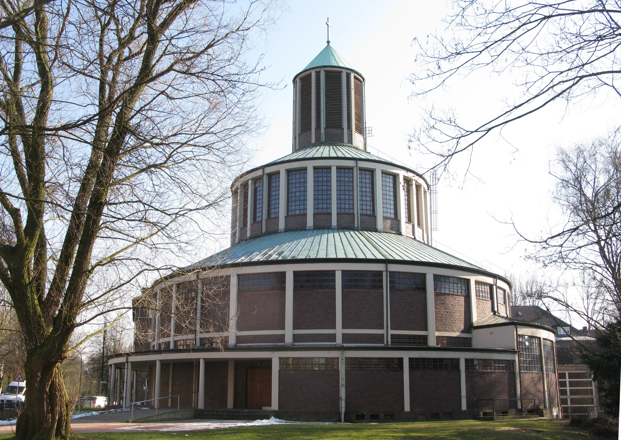 Auferstehungskirche, Essen-Südostviertel; Manteuffel-/Steubenstr